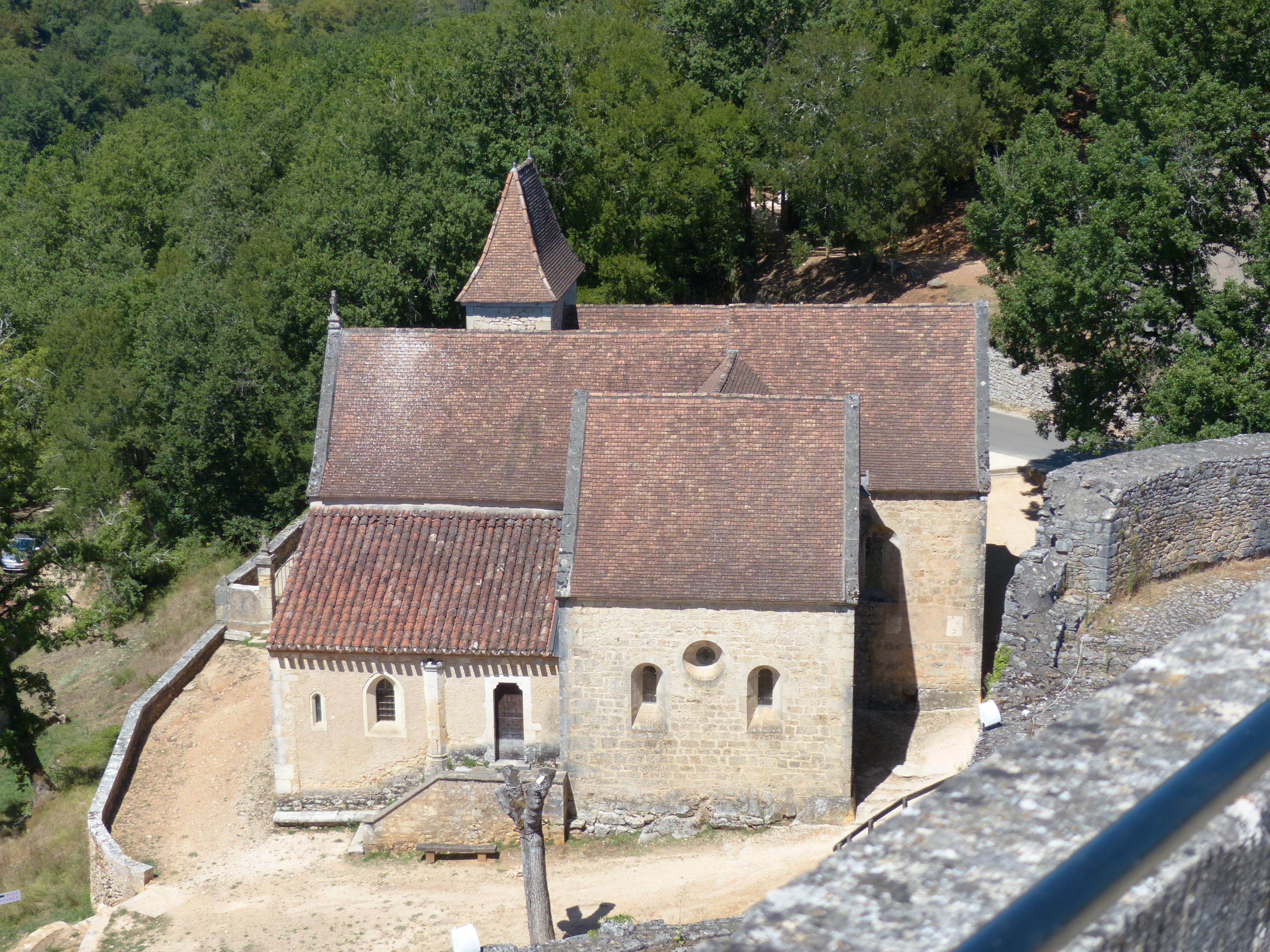 Château de Bonaguil. Saint-Front-sur-Lémance (Lot-et-Garonne). La chapelle vue du château.